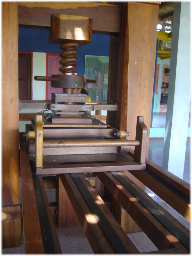 imprenta de Gutemberg se encuentra en el museo filosófico del parque Garza roja